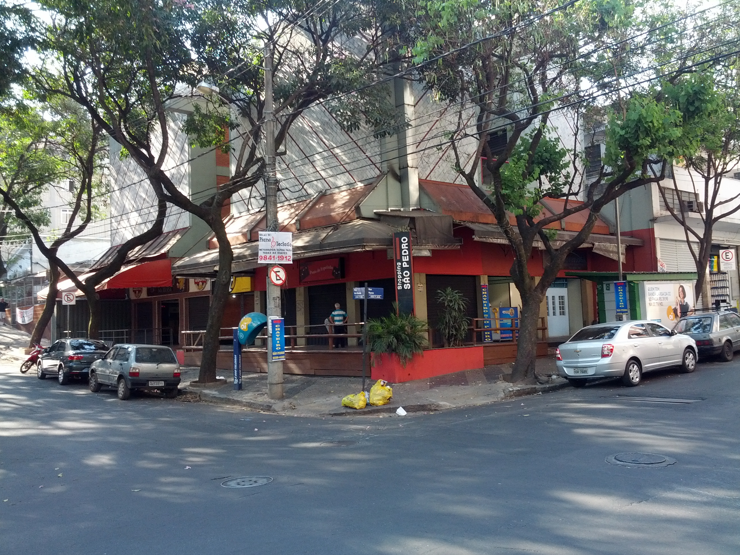 Shopping São Pedro, no bairro de mesmo nome (São Pedro), em Belo Horizonte, Minas Gerais, Brasil.